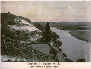 Окрестности Суджанского уезда